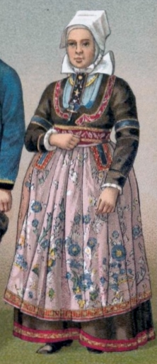 Albert Racinet : Femme de Plonévez-Porzay ; coiffe carrée, collerette largement tuyautée, corsage et jupe de drap brun brodé, large ceinture faite d'un ruban également brodé, tavanger de soie brochée, avec fleurs de diverses nuances (dessin publié dans "Le costume historique", volume 6, 1888)